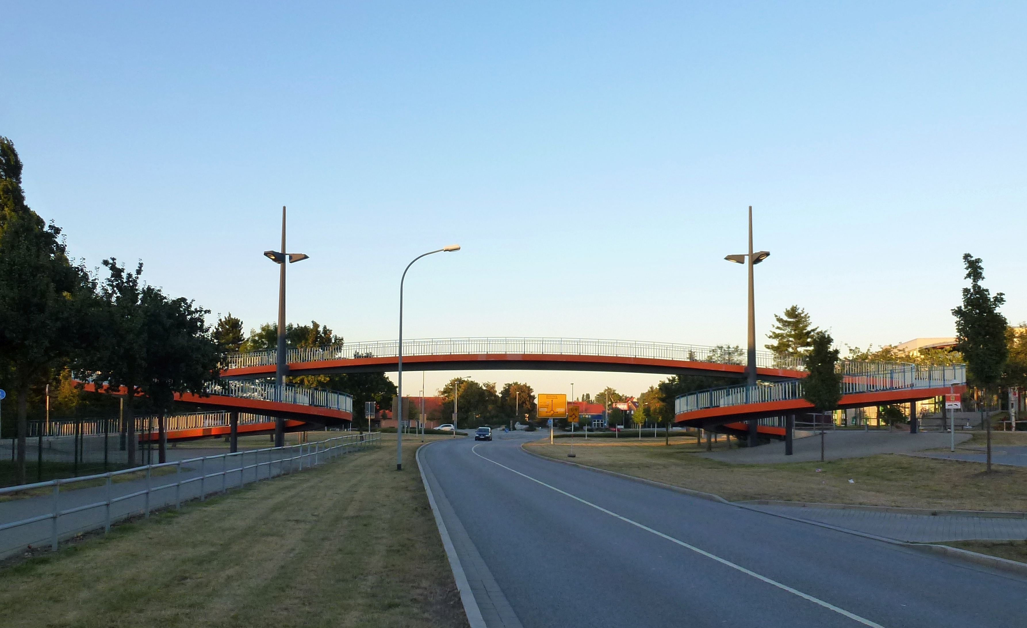 Die Fußgängerbrücke über die Halberstädter Straße verbindet die Wohngebiete Stadtfeld und Burgbreite. Die im Volksmund auch Kilianskreisel, nach dem damaligen Bürgermeister Martin Kilian, genannte Brücke wurde 1977 errichtet und im Jahr 2007 saniert.